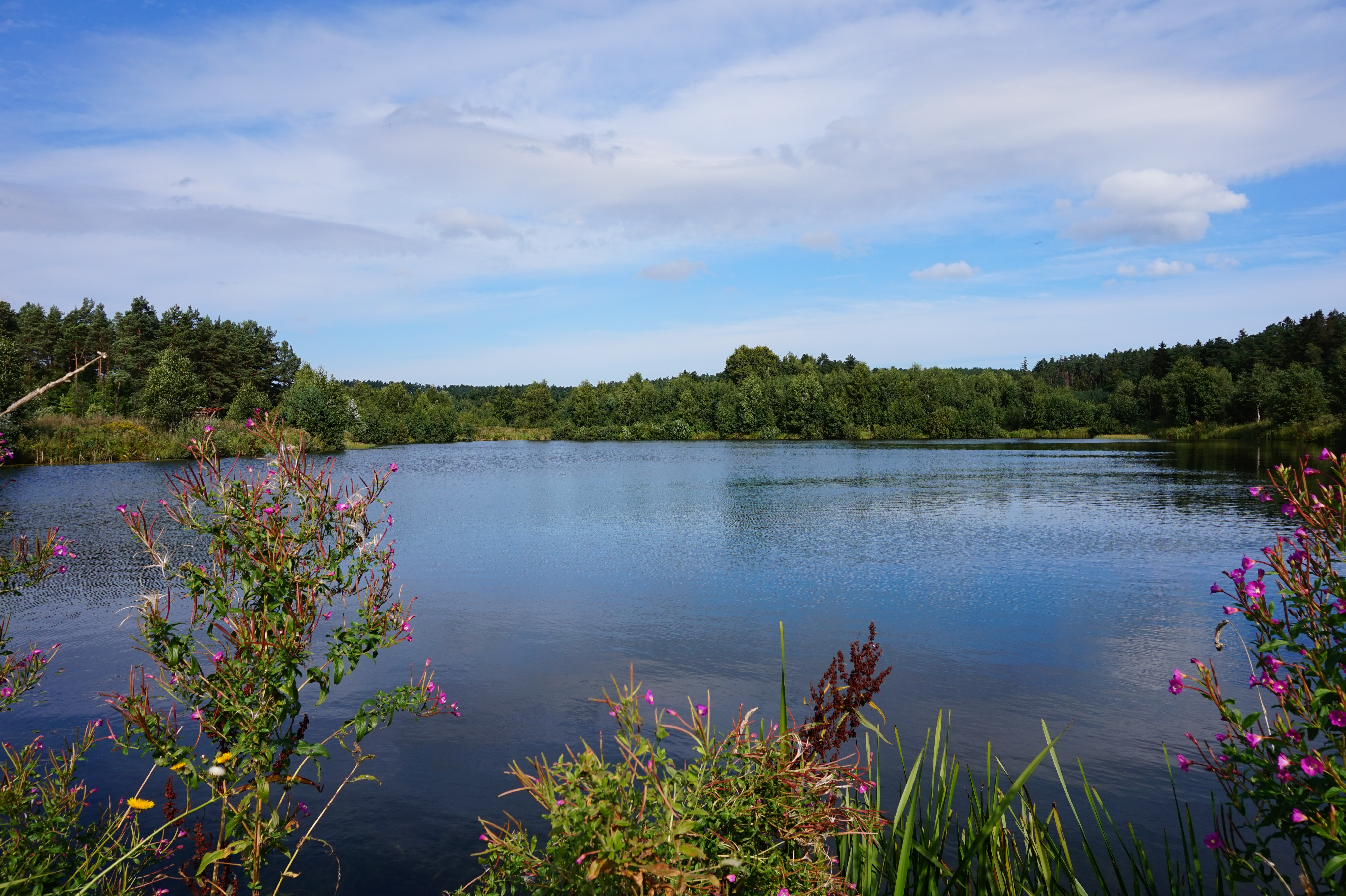 Sulmin - zbiornik retencyjny